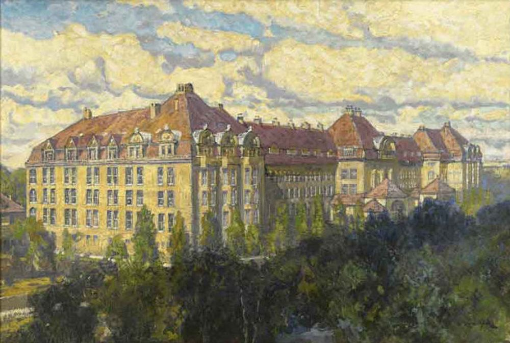 Die Samuel-Heinicke-Schule in Leipzig zur Zeit ihrer Erbauung. Gemälde von Walter Syrutschoeck, 1915